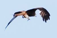 Rotmilan mit gefangenem Fisch im EU-Vogelschutzgebiet Westlicher Düppeler Forst